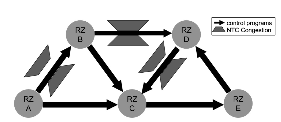 Horizontale Struktur der Regelzonen ohne NRV